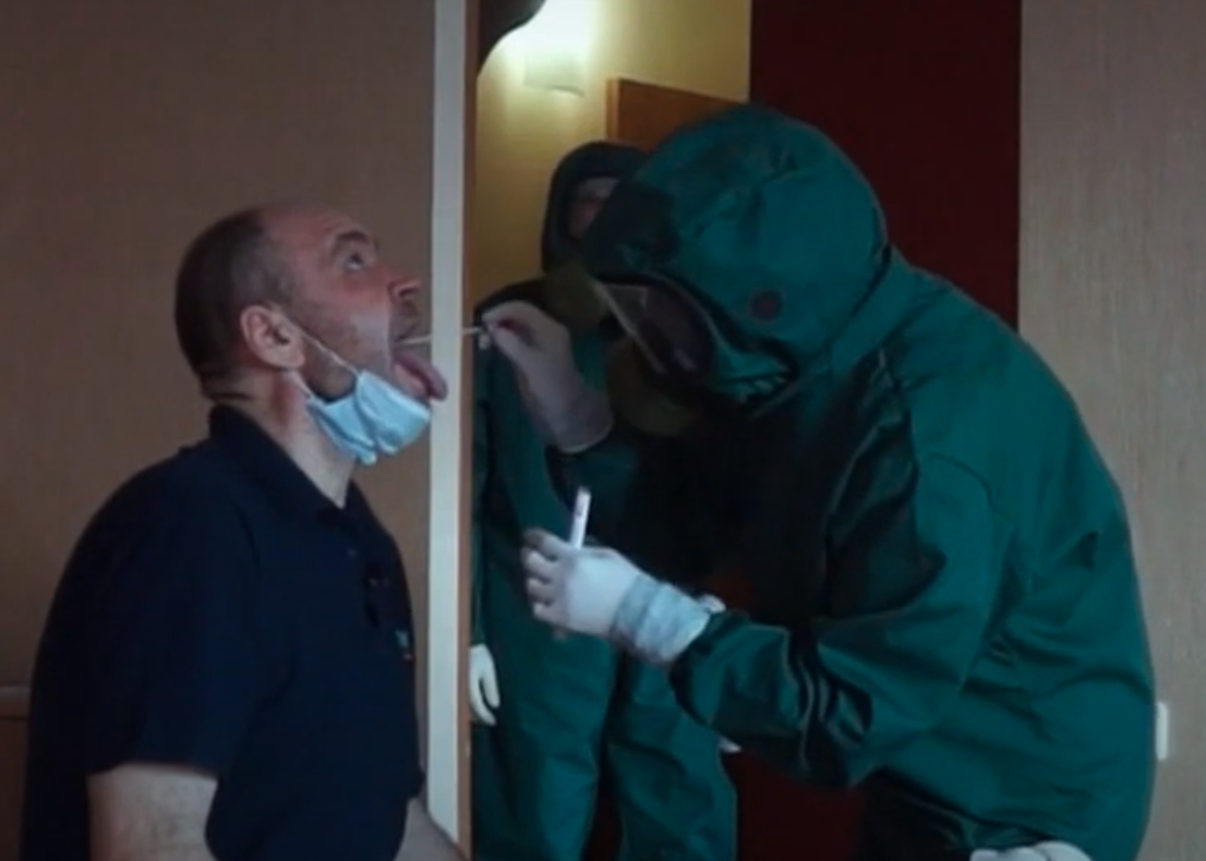 Процесс взятия проб на наличие COVID-19 у корреспондента и оператора «Вестей Алтая» Николая Березовского в г. Рубцовск Алтайского края